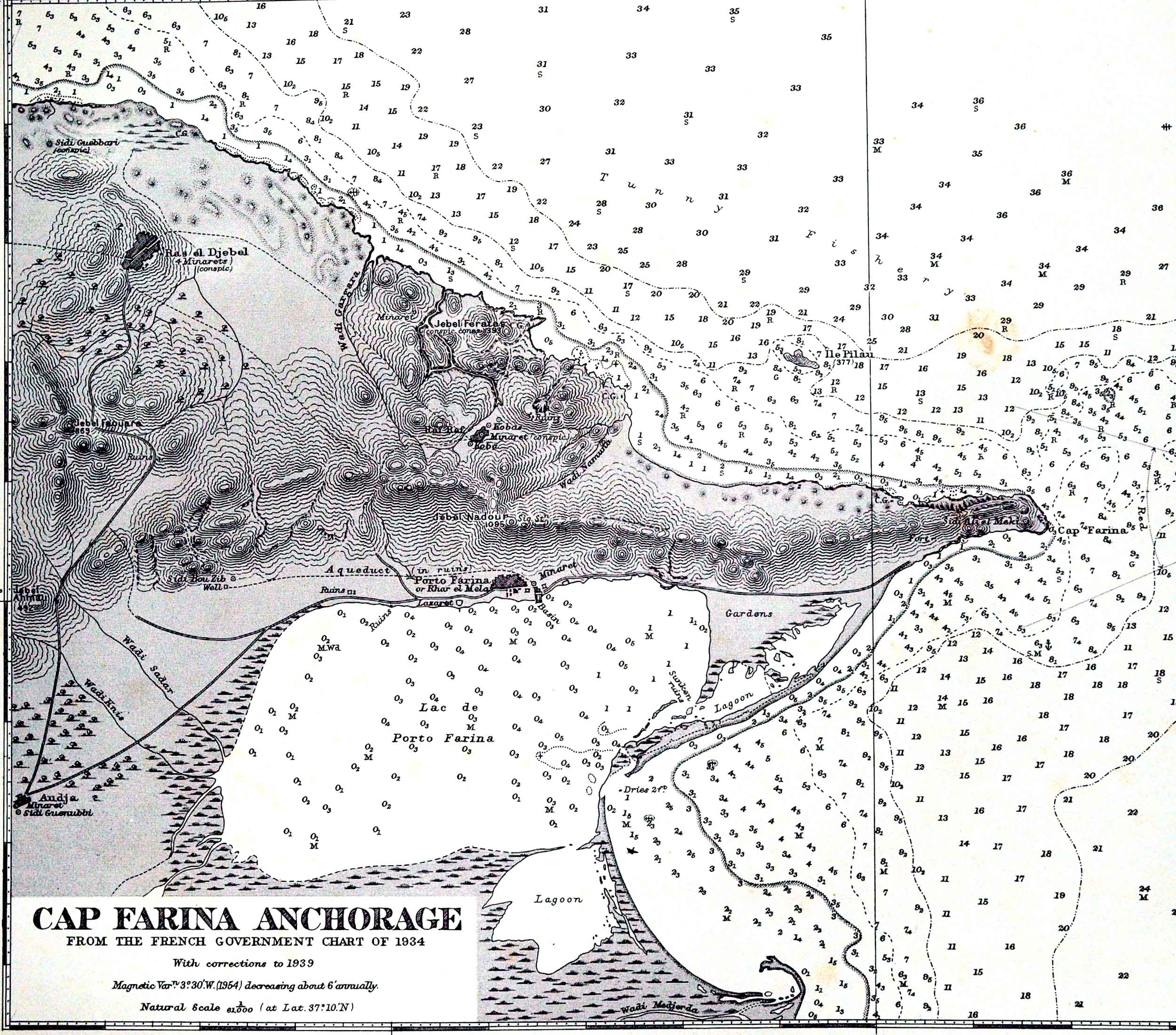 Porto Farina - Le cap et le lac - 1939